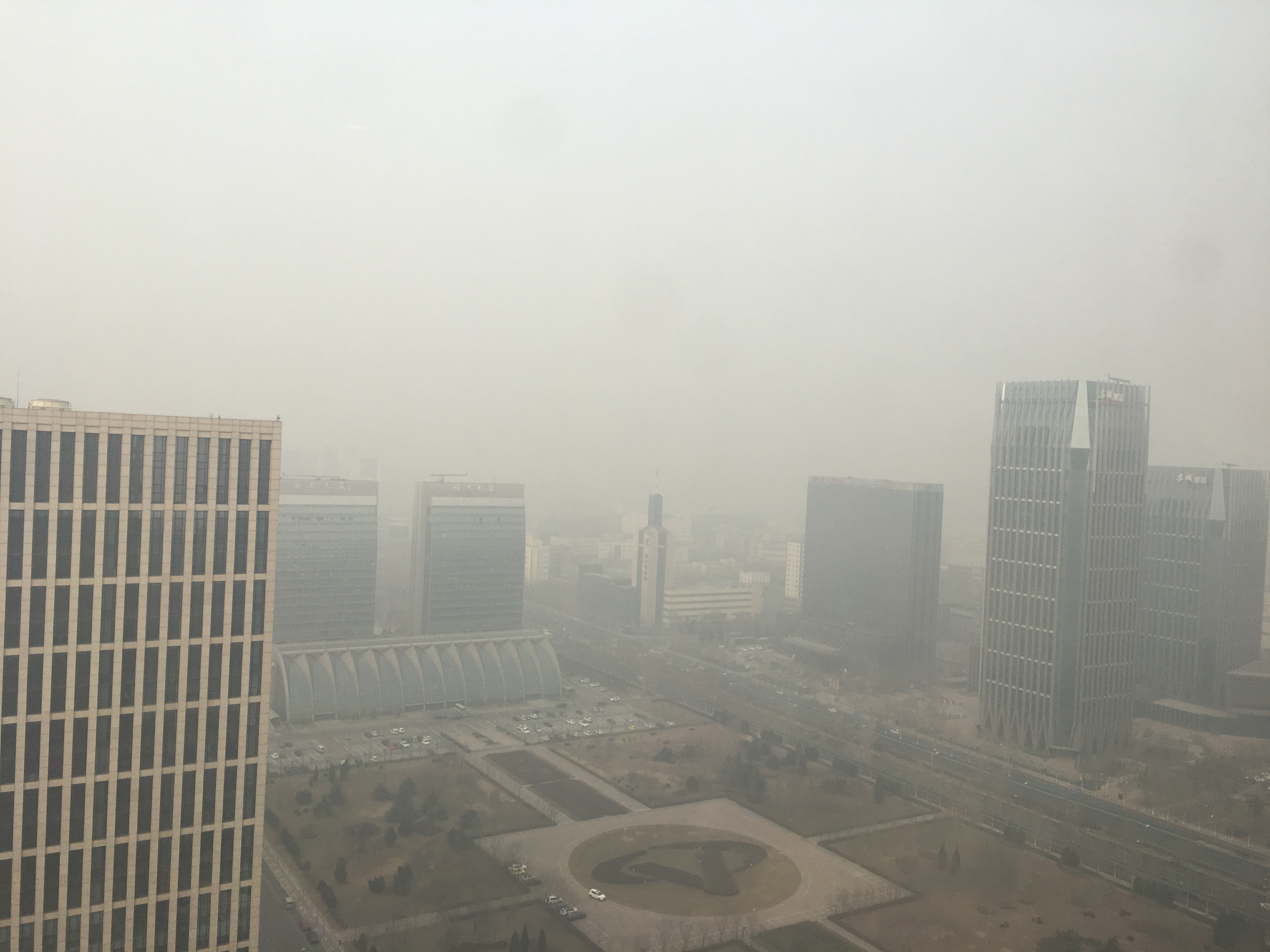 2016年12月30日中午，北京南郊霾色渐浓。（美国之音新闻图片）